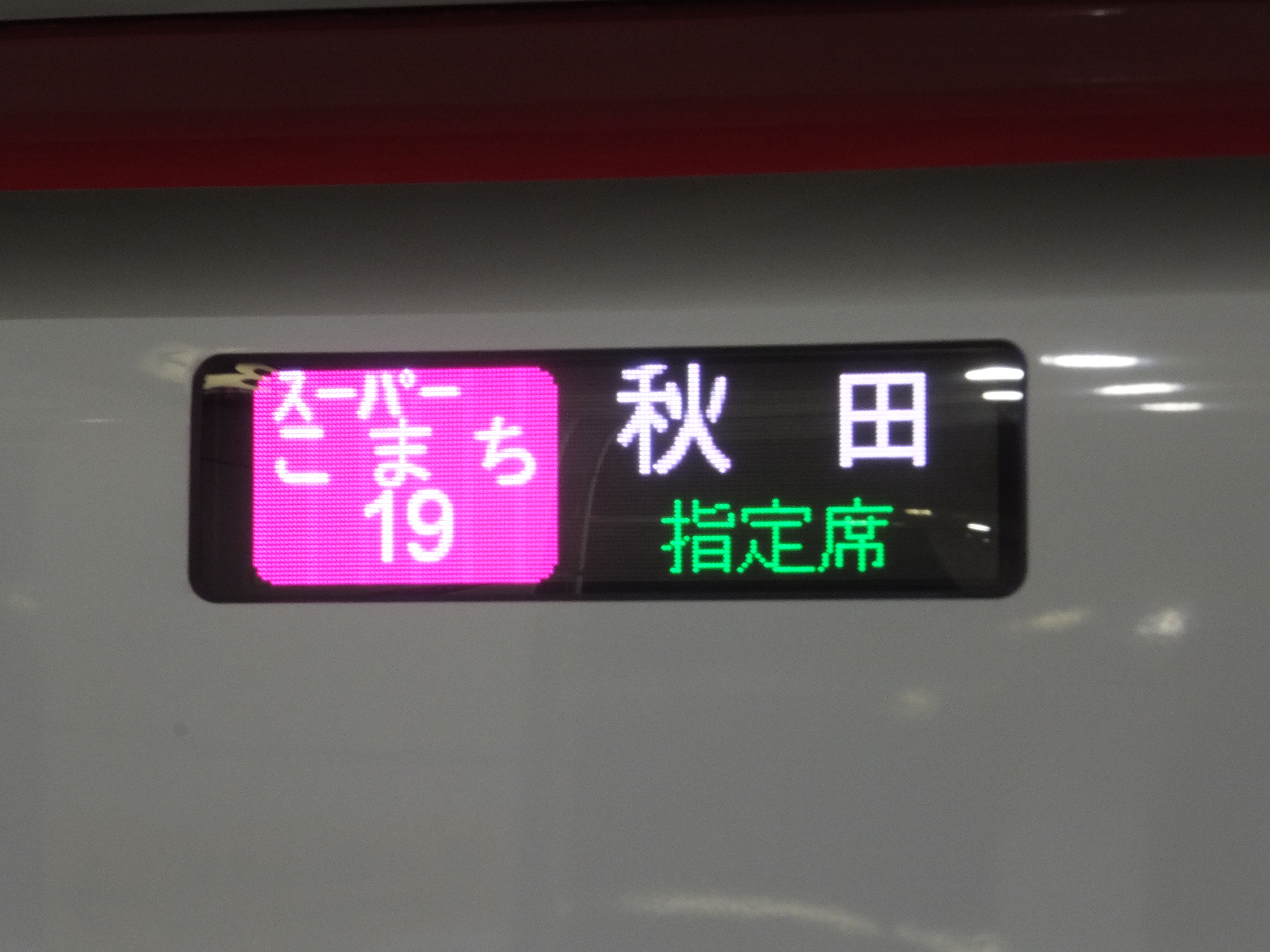 「スーパーこまち19号」の列車表示。「スーパーこまち」の愛称は2013年3月～2014年3月までの1年間のみ使用された。